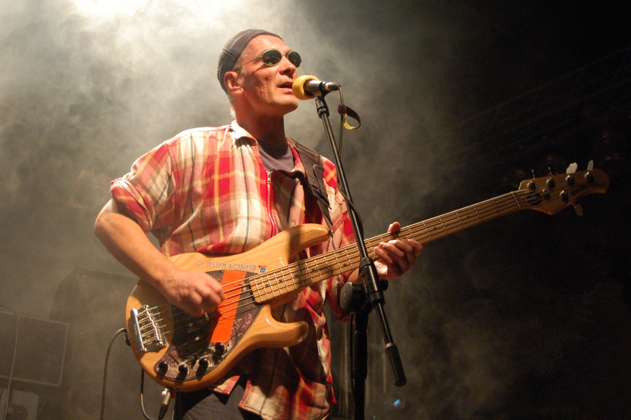 Lech Janerka in Poznań, Zamek